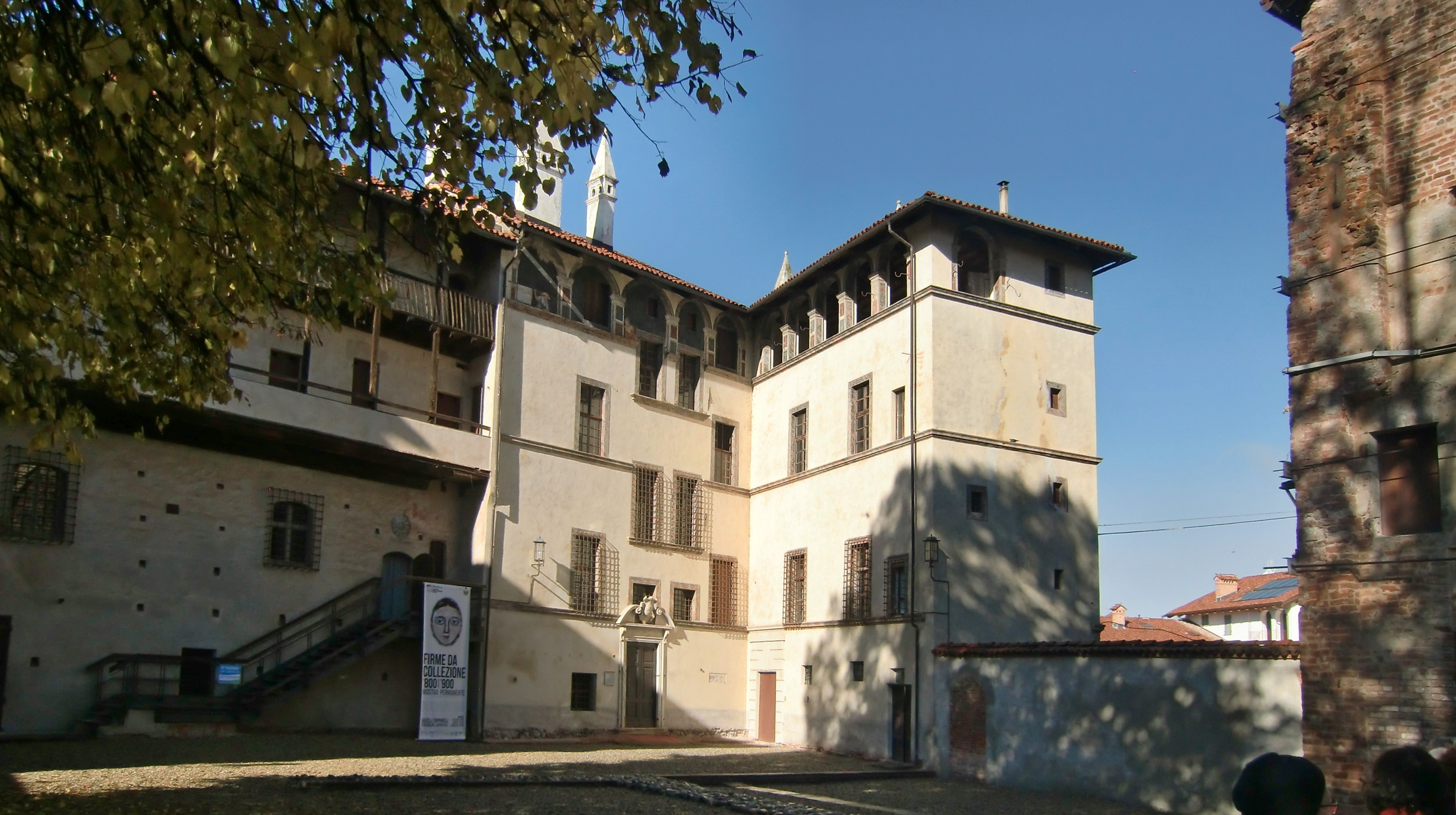 Lagnasco, Castello dei Marchesi Tapparelli d'Azeglio